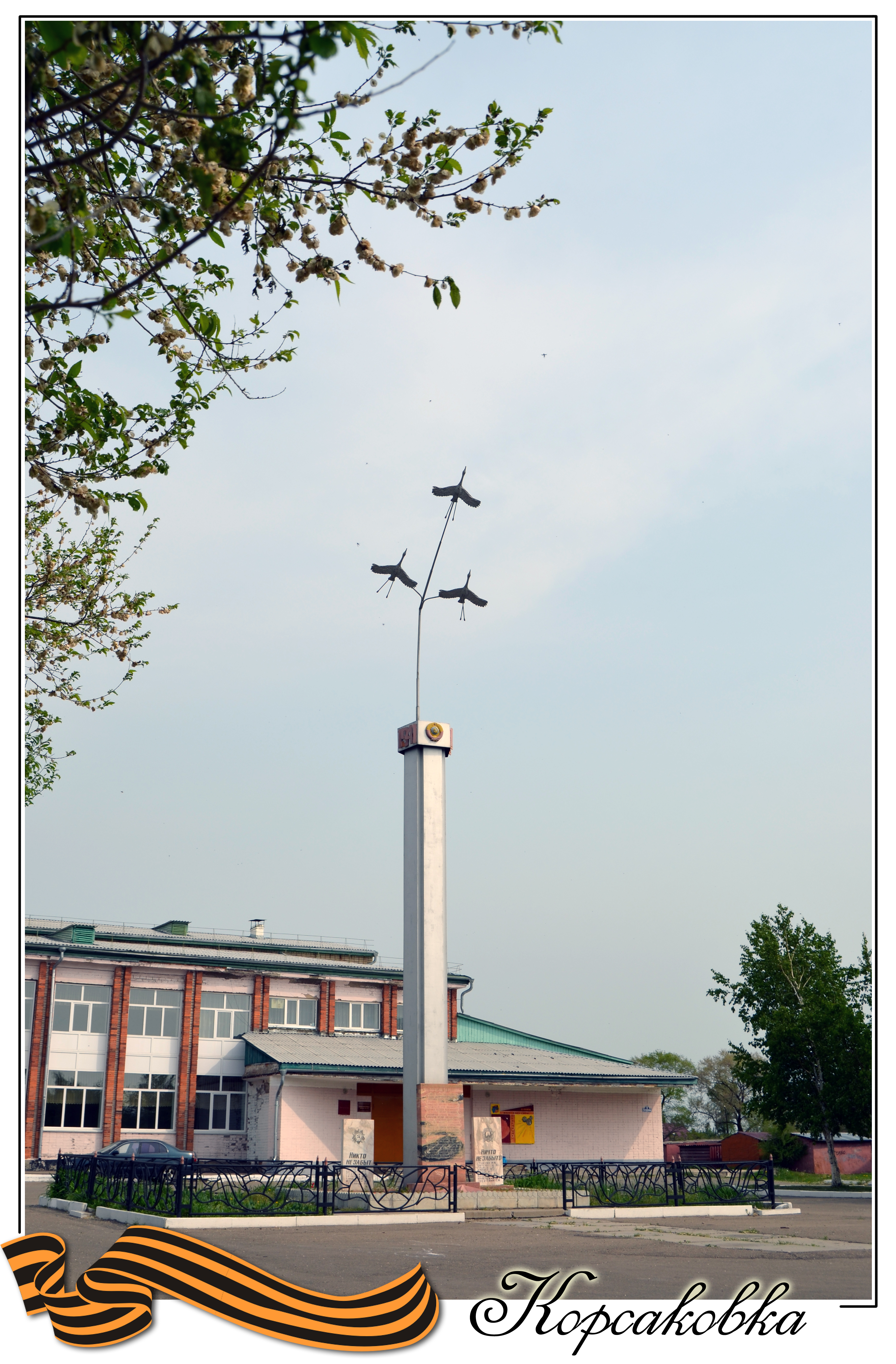 Памятник односельчанам, погибшим в годы Великой Отечественной войны 1941-1945.